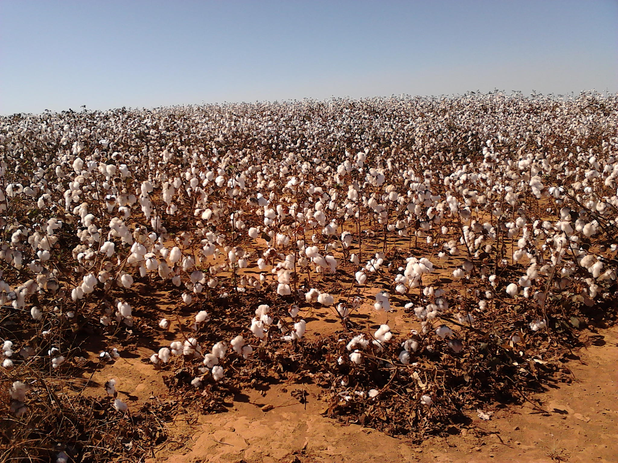 Mais Uma Riqueza no Maranhão